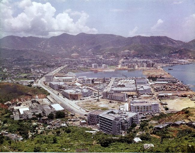 1961年荃灣填海工程